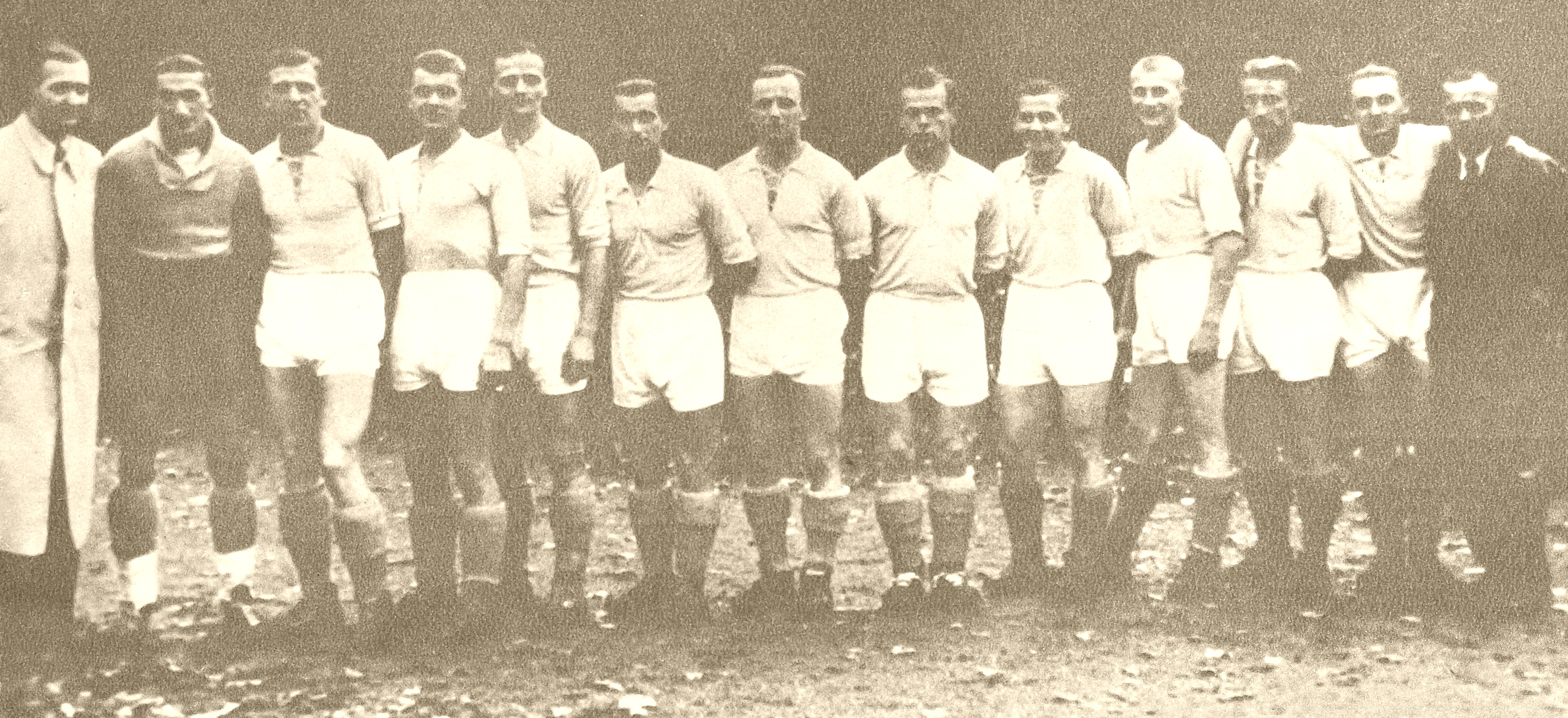 Ruch Chorzów w 1945 roku